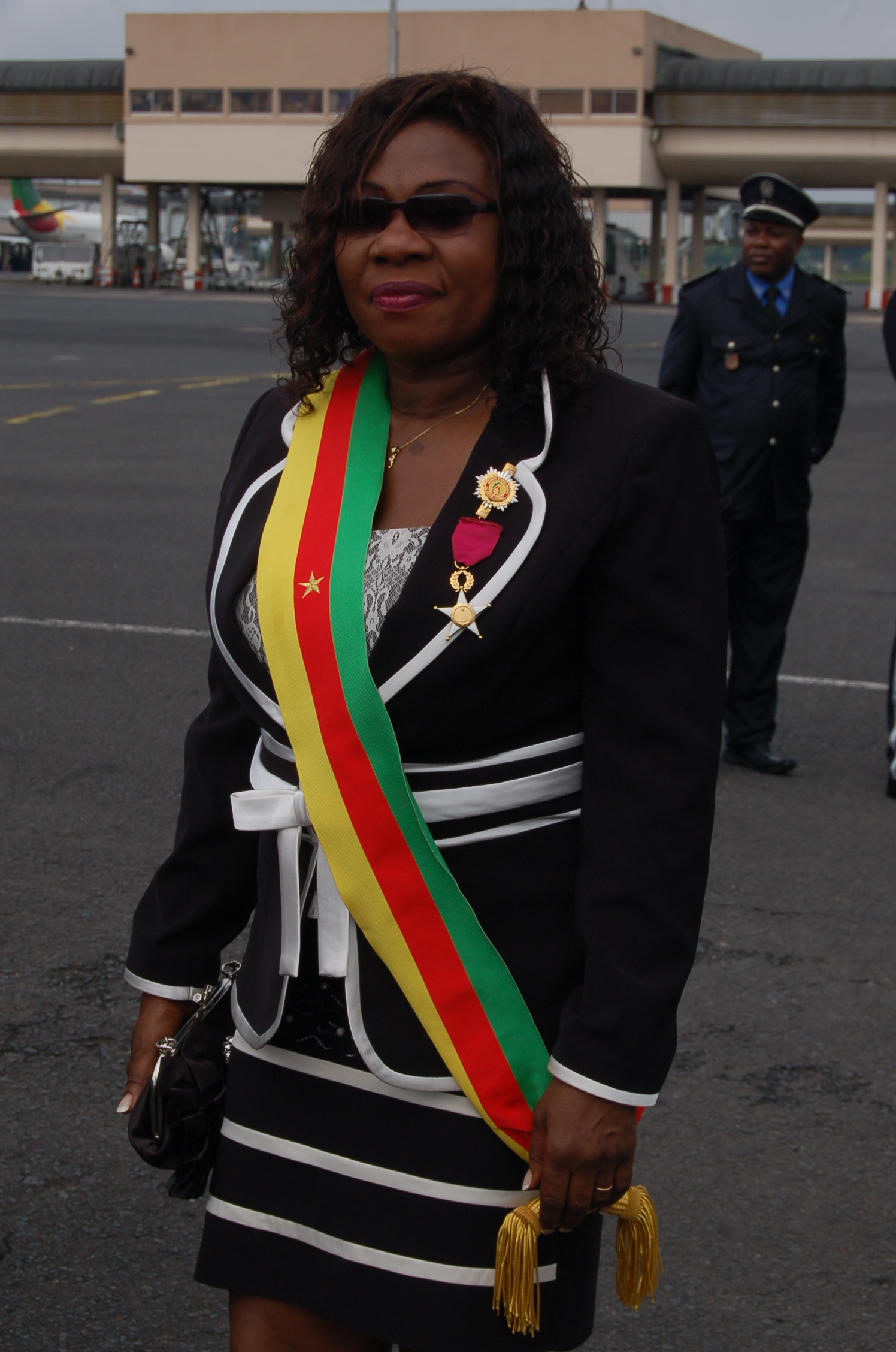 Mme Faustine Fotso, députée des hauts-plateaux dans l'Ouest du Cameroun